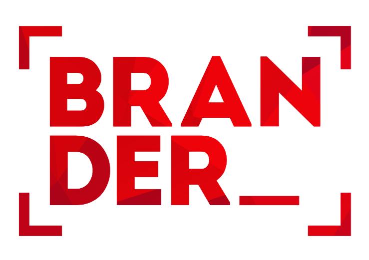 Marketing & Contenido Digital